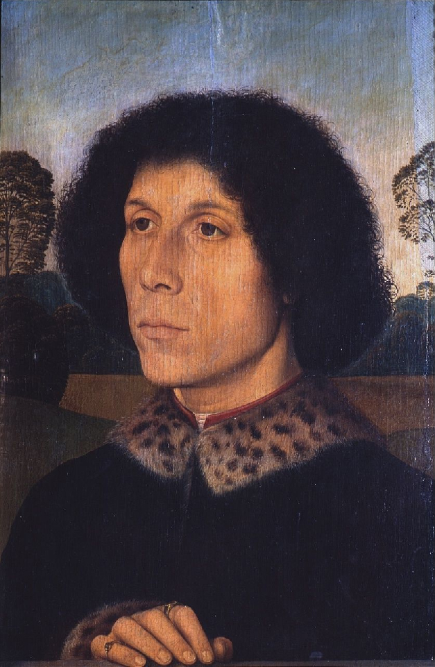 Hans memling, ritratto d'ignoto, uffizi